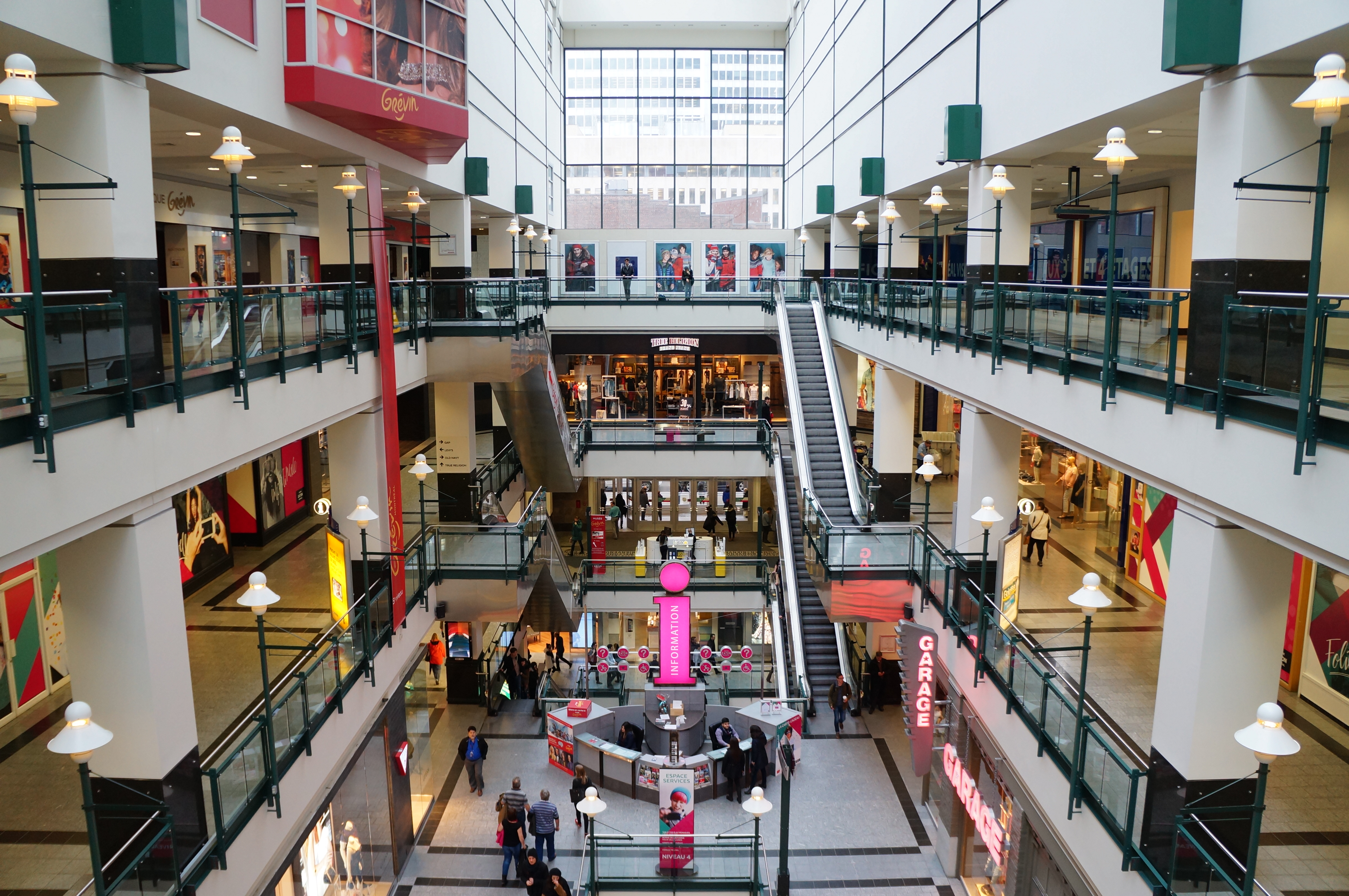 Le Centre Eaton de Montréal